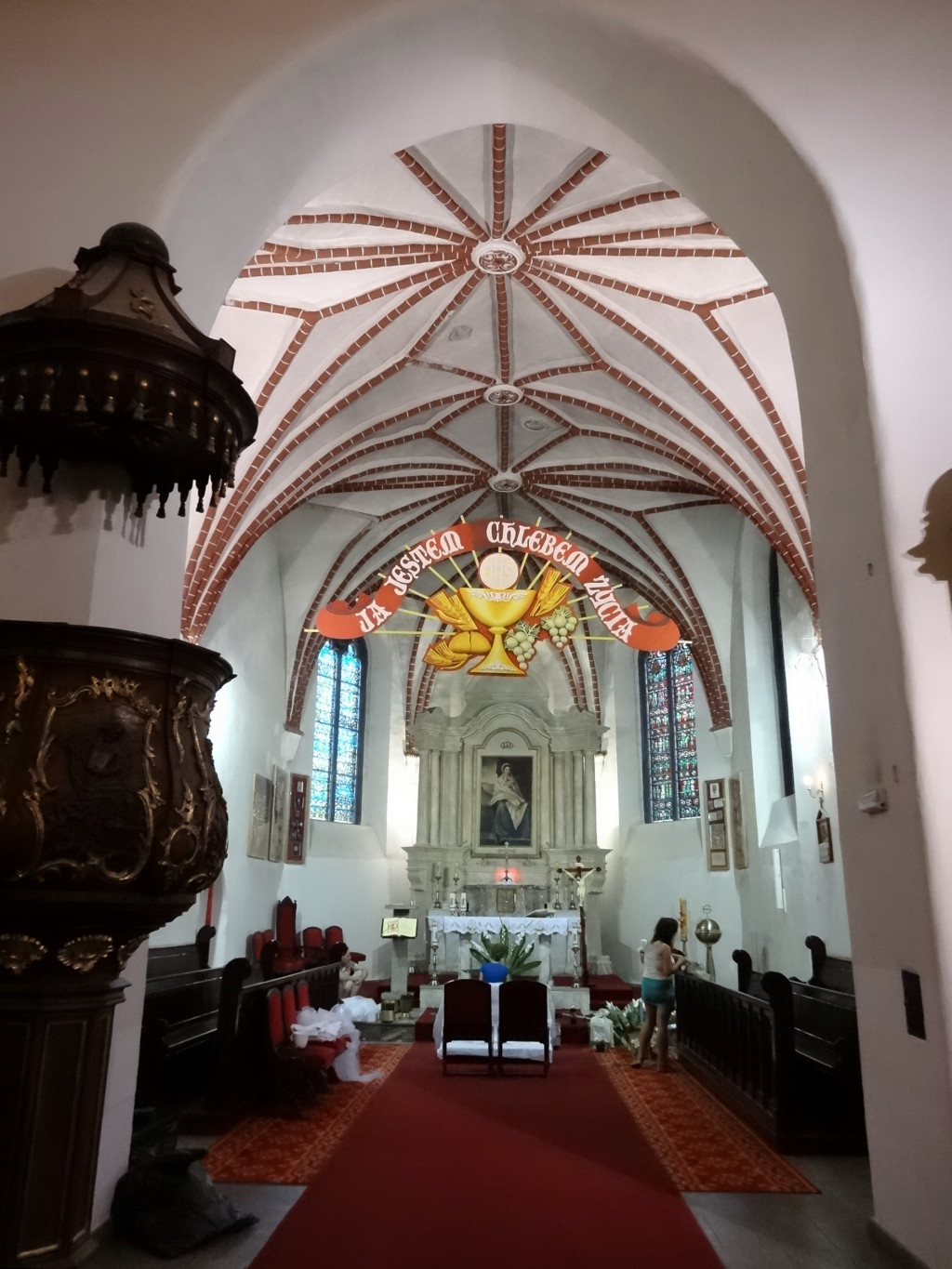 Wnętrze kościoła pobernardyńskiego p.w. Najświętszej Maryi Panny Królowej Pokoju (zbud. 1552-1557, do 1830 kościół klasztorny bernardynów bydgoskich, od 1866 r. garnizonowy); na zdj. nawa ze sklepieniami gotyckimi